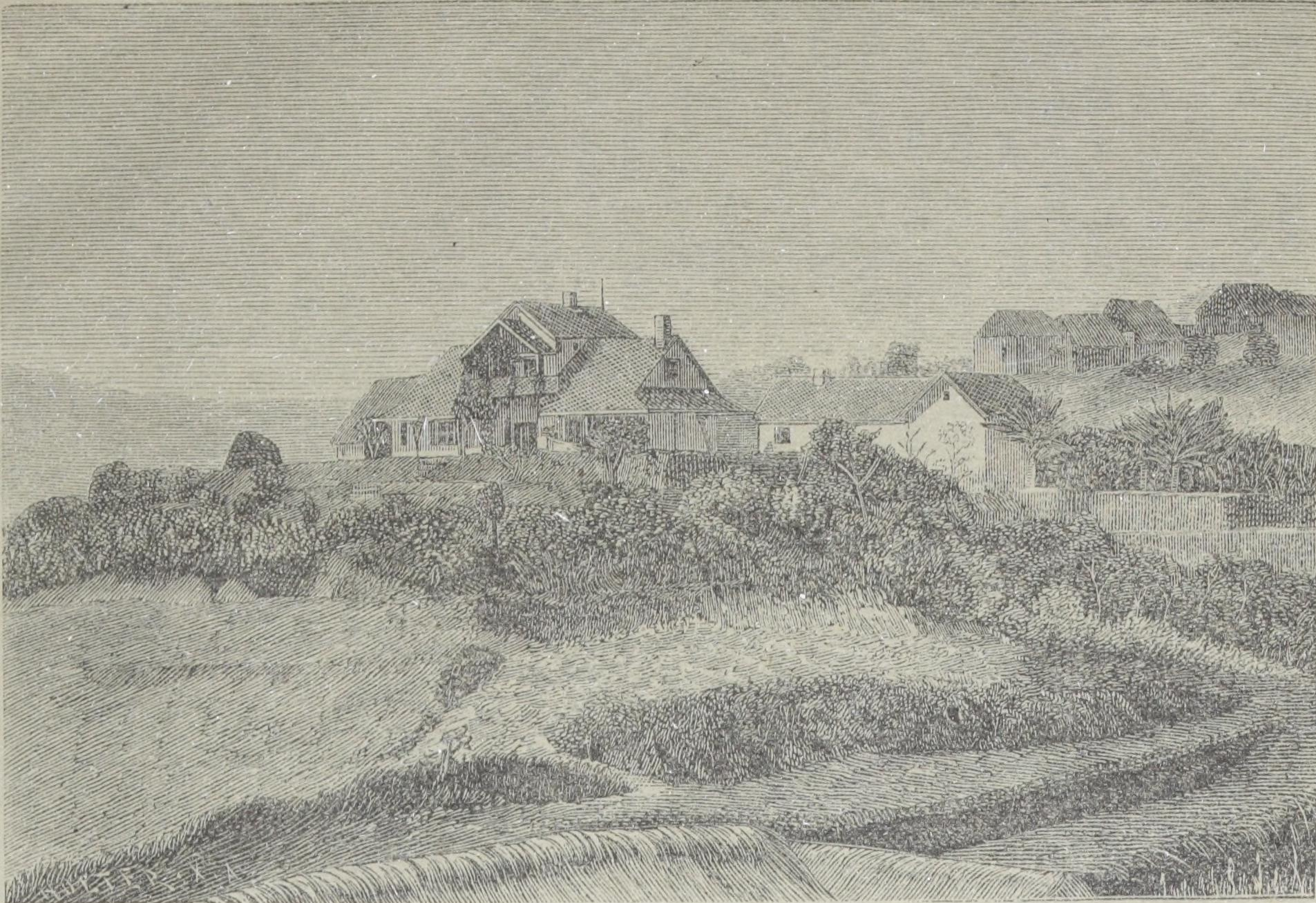 «Manandoana». Illustrasjon hentet fra boken "En kortfattet Oversigt over Madagascar, dets Folk og Mission" av Borchgrevink, Chr. og utgitt av Det Norske Missionsselskabs Forlag (Kristiania, 1885)